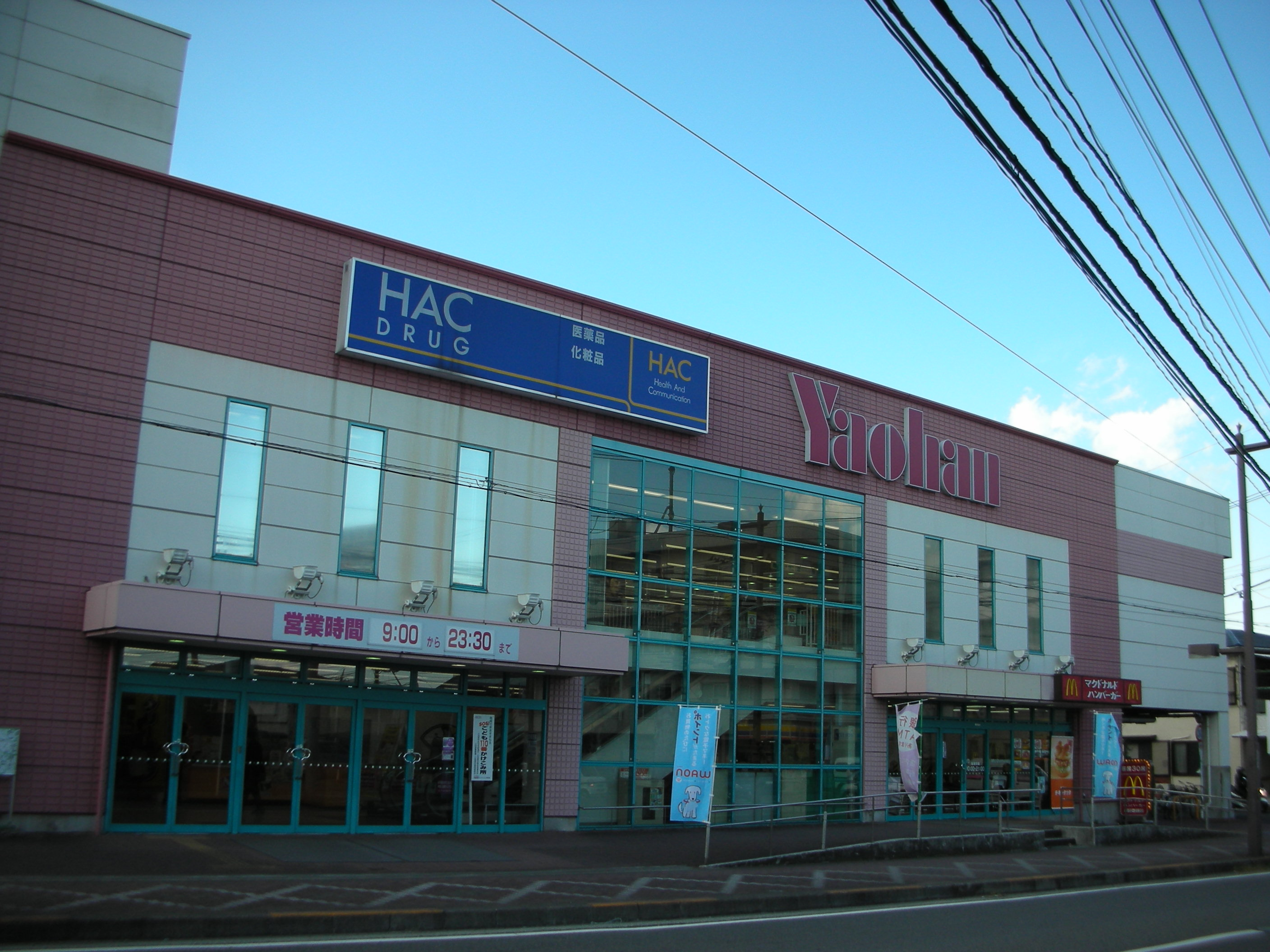 ヤオハン荻窪店の外観